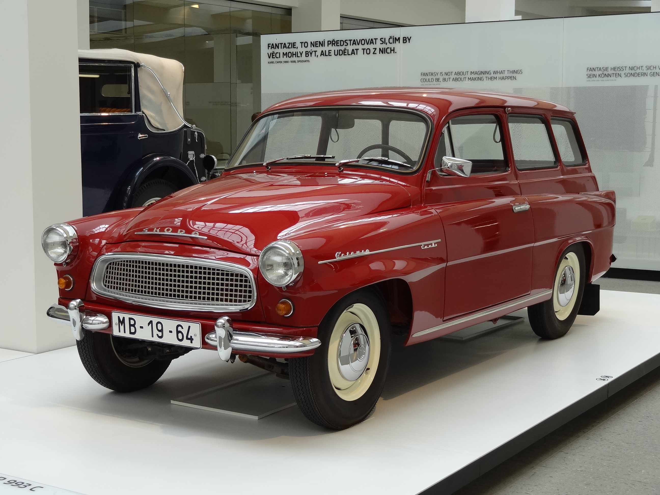 years of production: , cylinders: 4, displacement: 1300 ccm, output: kw (hp), gearbox: 6+R, max speed 210 km/h"Der beliebte Octaviakommt 1961 als Combi auf den Markt. Das "mehrzweckauto" vereint Komfort und Großzügigkeit einer Reiselimousine mit den praktischen Vorzügen eines "Nutzfahrzeuges": geteilte Heckklappe und ebene Ladefläche.Über 54.000 Stück rollen im Werk Kvasiny vom Band - viele gehen in den Export." (Hinweistafel)